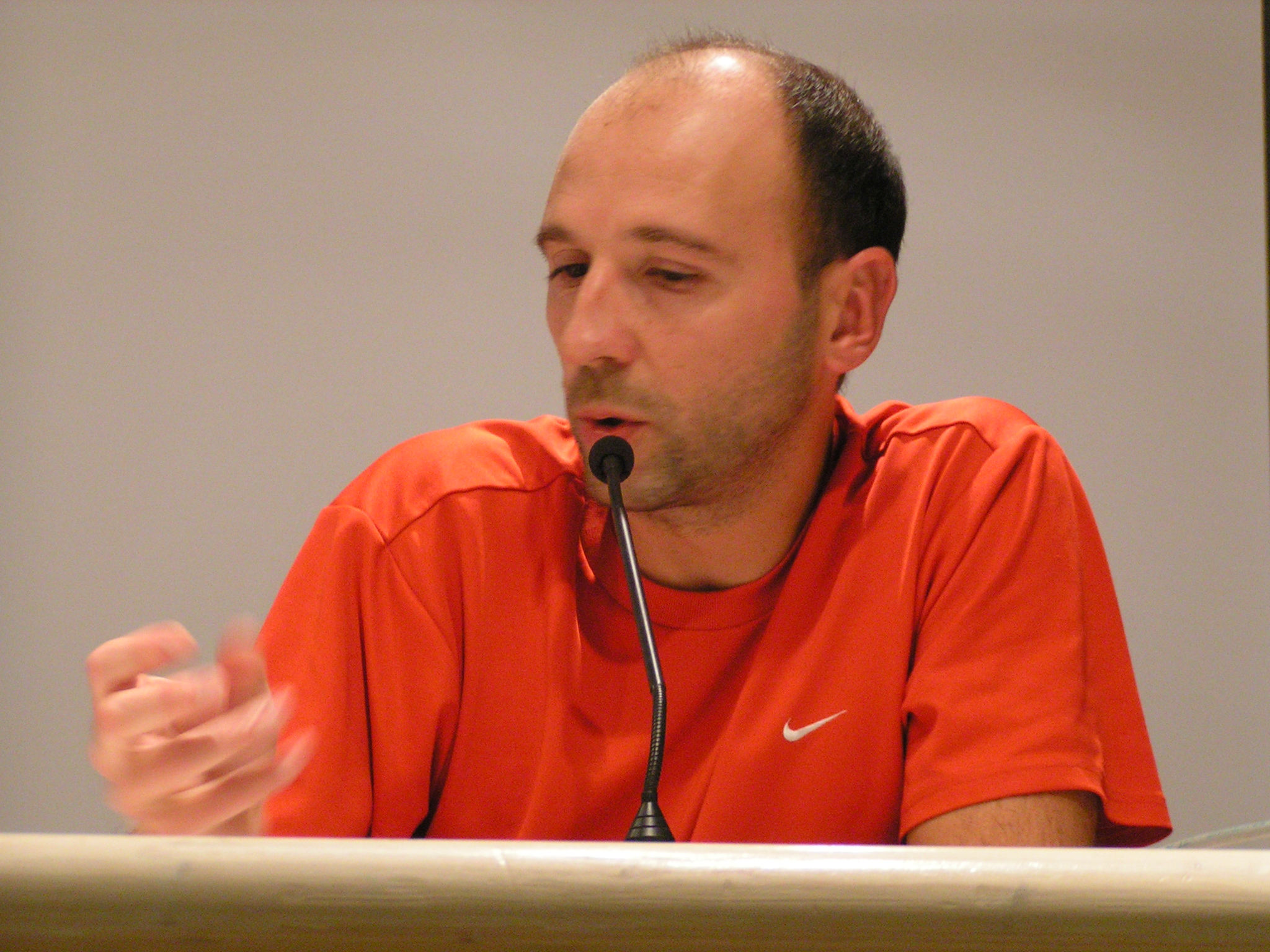 Lo scrittore Mauro Covacich nel corso del suo intervento al XII seminario di formazione per giornalisti del Redattore Sociale